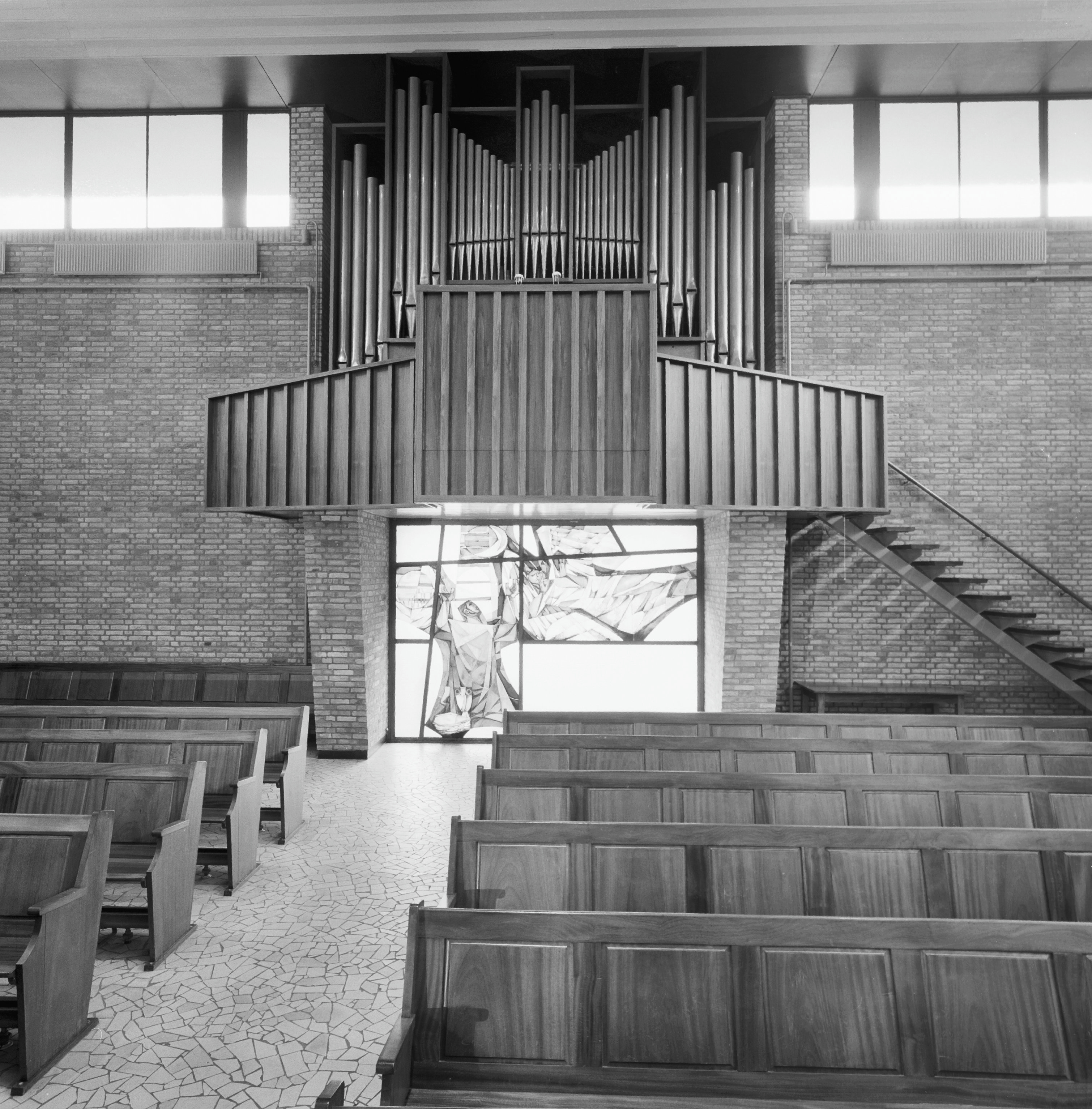 Hervormde Bethelkerk: Interieur, overzicht orgel en raam met gebrandschilderd glas